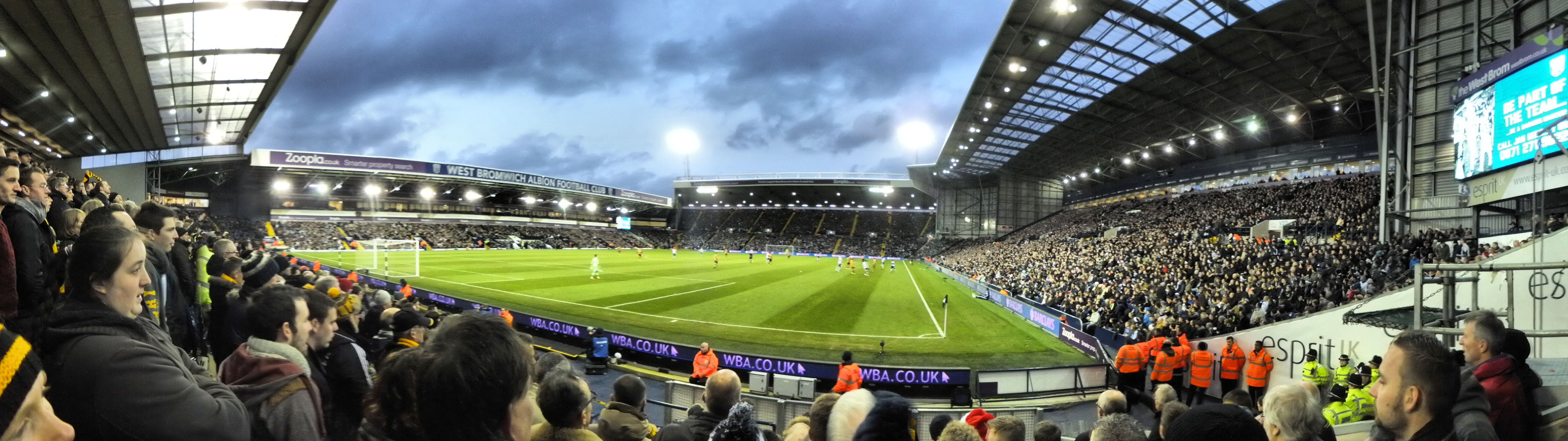 Baggies 1-1 Tigers